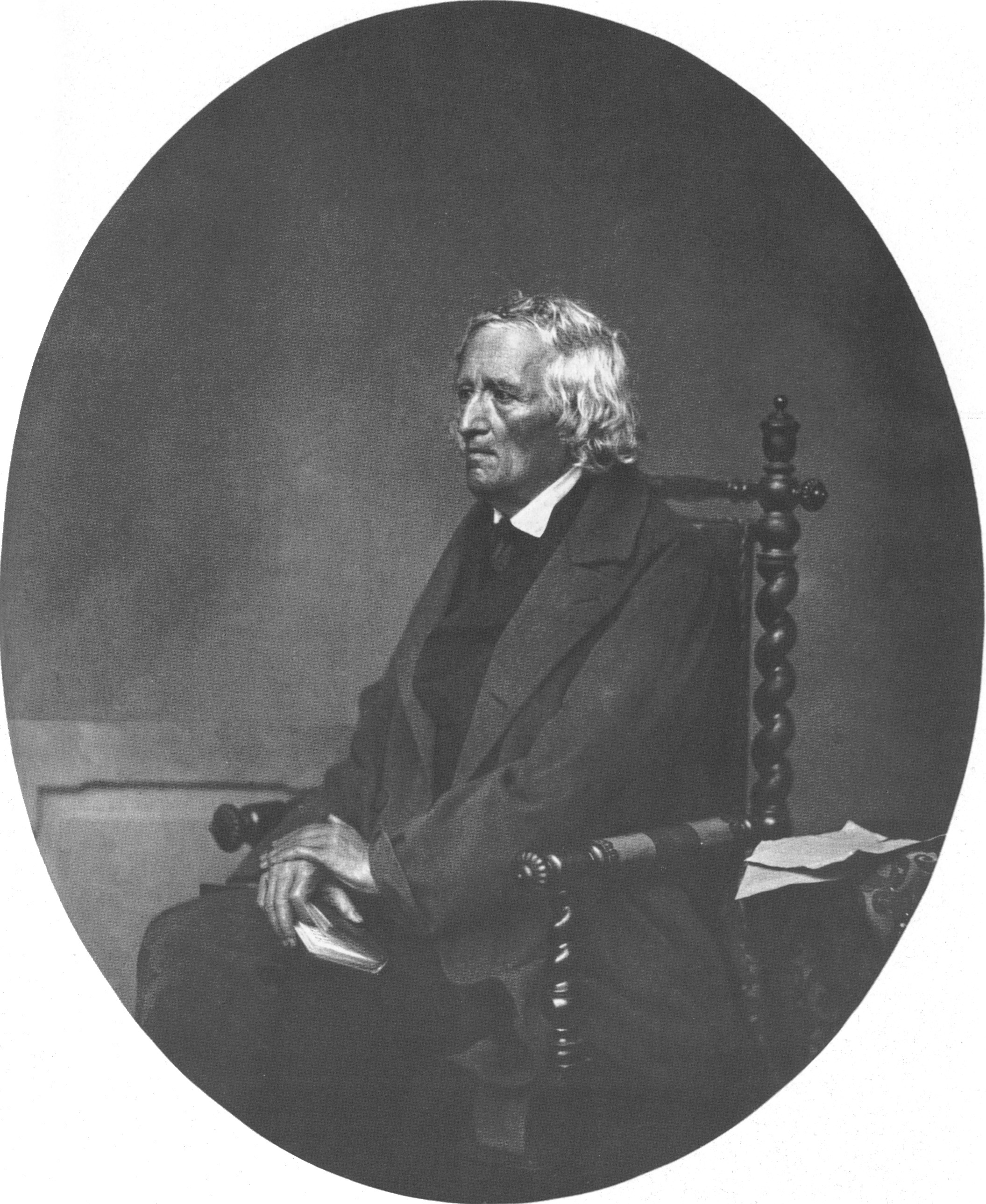 Jacob Grimm (1785-1863)